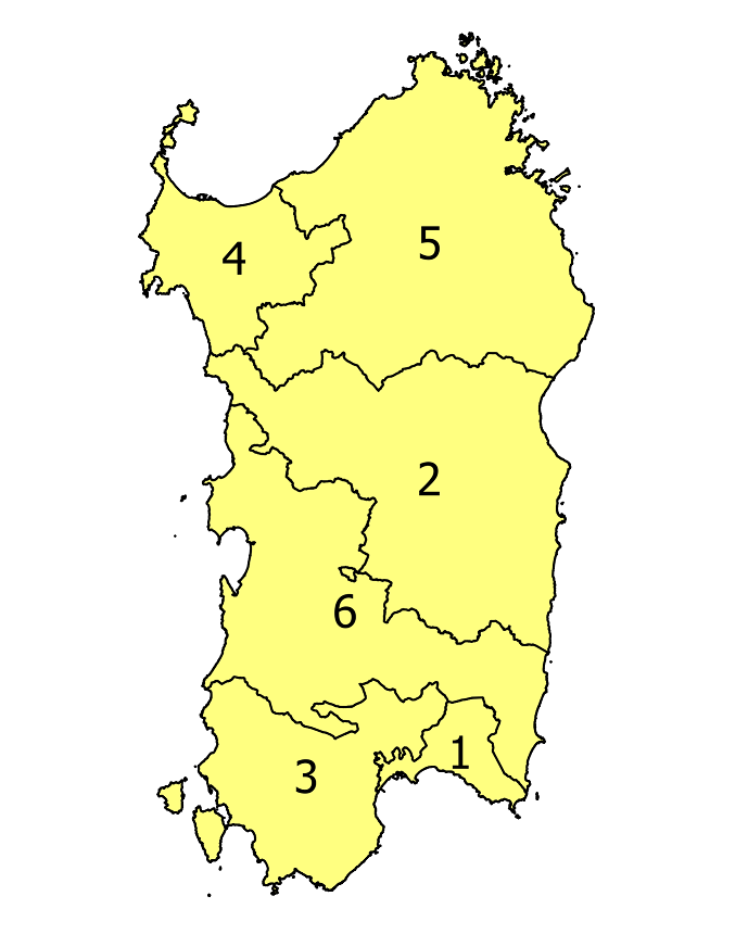 Collegi Mattarella Sardegna Senato